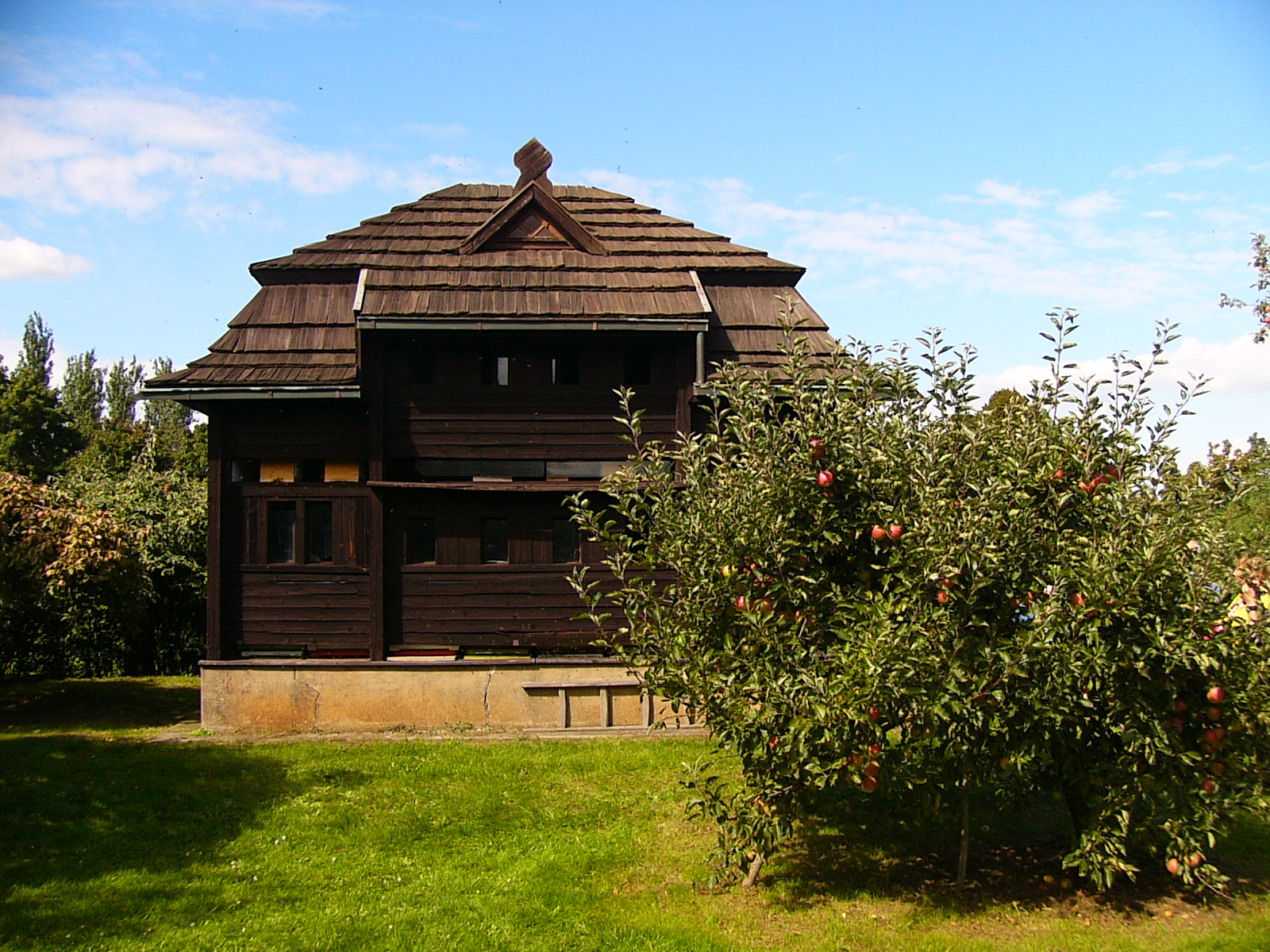 Masarykův včelín v Lumbeho zahradě